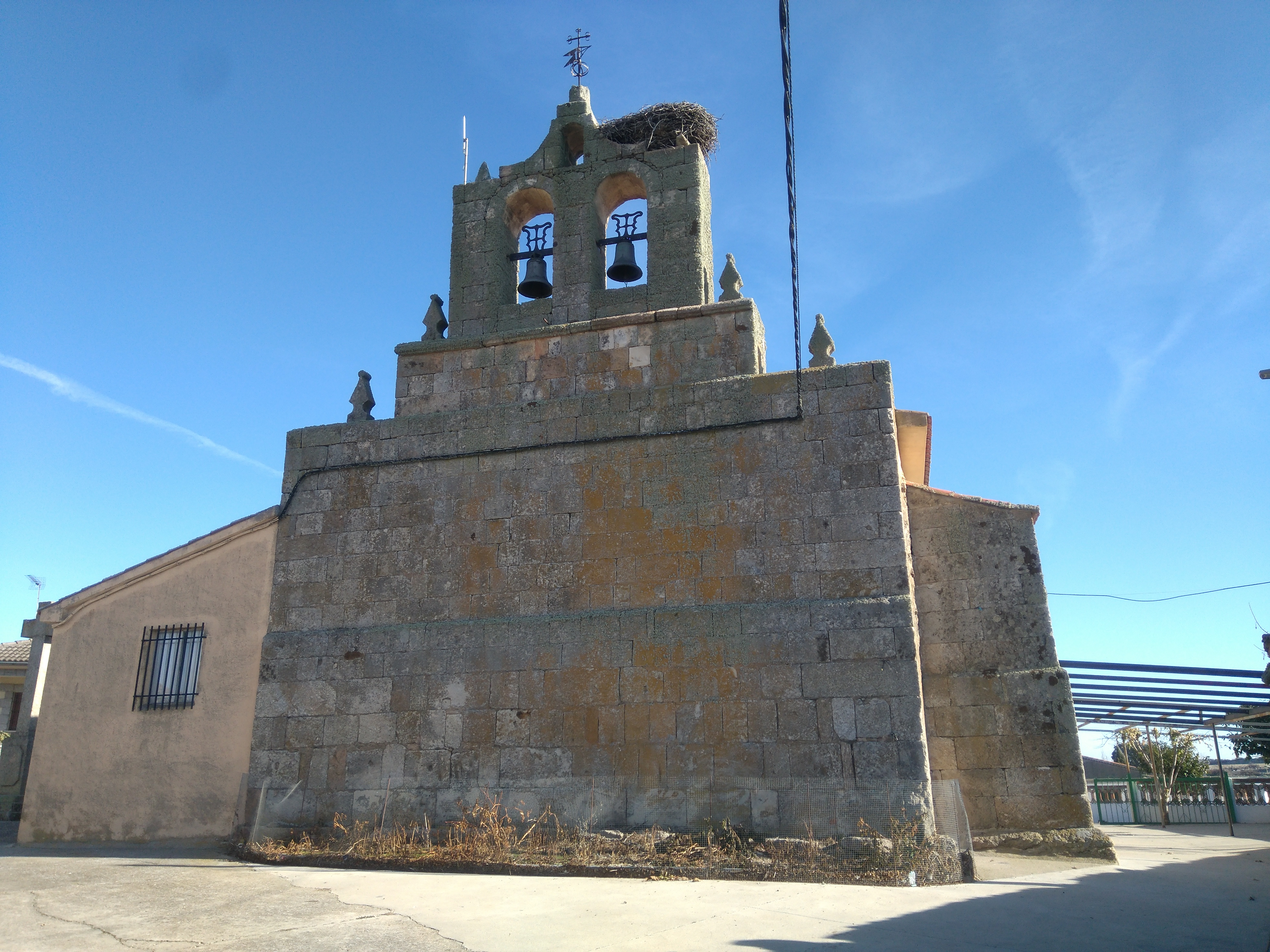 Estamos ante la portada de la iglesia parroquial de Santa Cruz en Añover de Tormes. Esta iglesia ha sido recientemente restaurada con la donación de los vecinos. En el lateral vemos los típicos contrafuertes románicos.